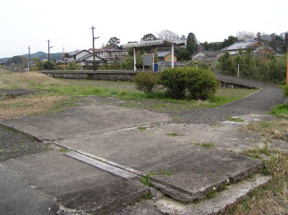 2005/03/26に投稿者が上伊万里駅にて撮影